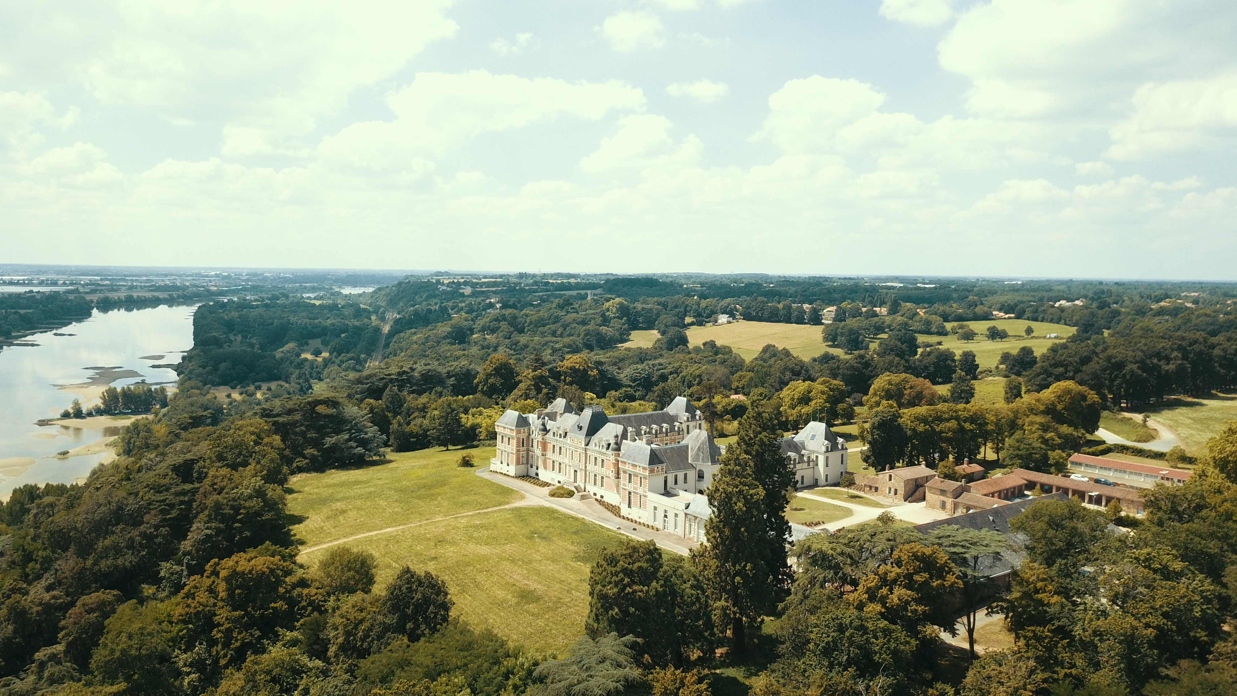 Château de Clermont, Le Cellier, Loire Atlantique. Loire Valley. Vallée de la Loire.